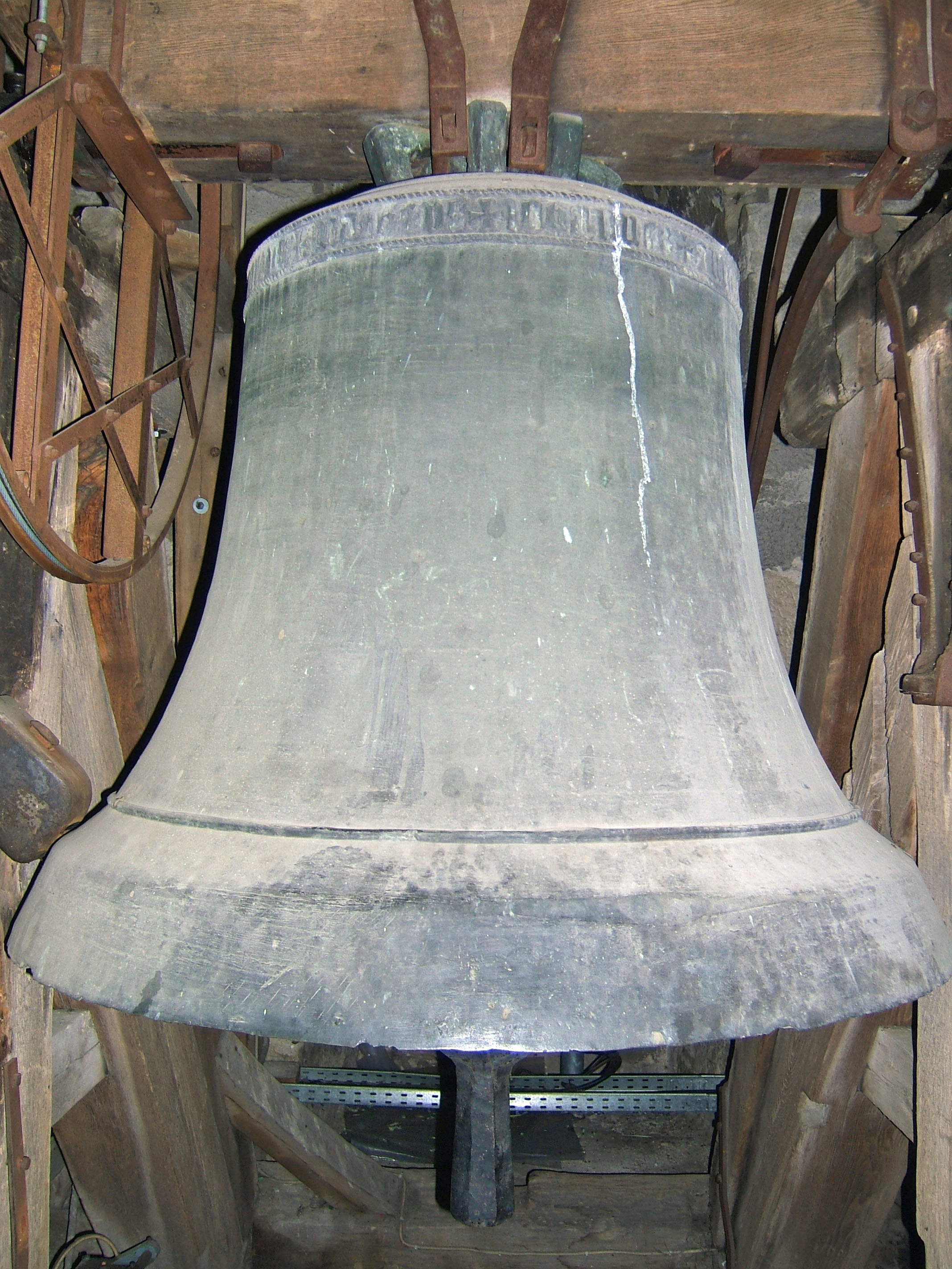 Große Glocke von 1456 im Turm der St.-Veit-Kirche in Gärtringen